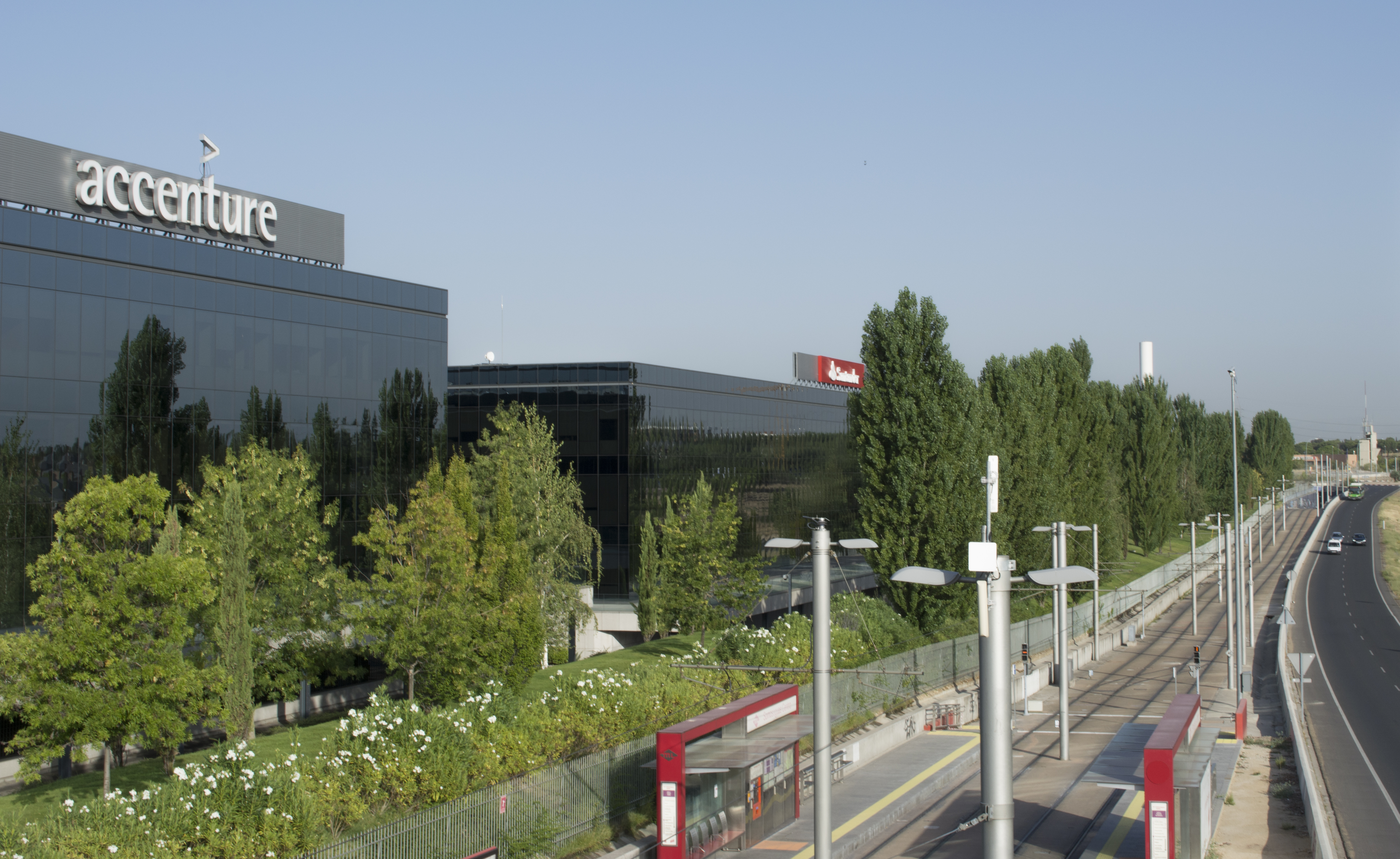 Vista en alto del Complejo Empresarial La Finca y de la estación de Metro Ligero Madrid de Somosaguas Centro, situados en Pozuelo de Alarcón.